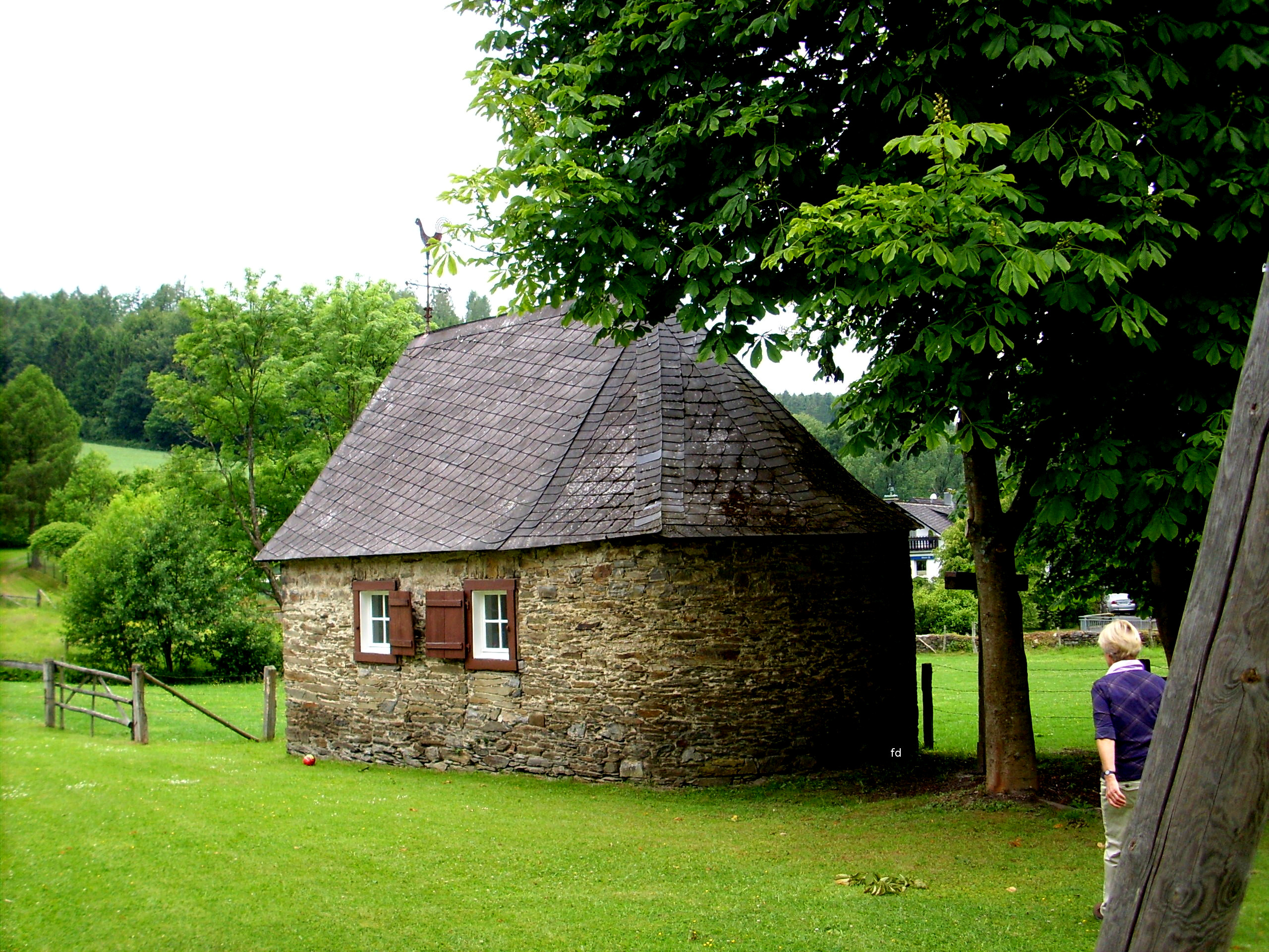 St. Johannes Nepomuk Kapelle von 1720 in Mülsborn